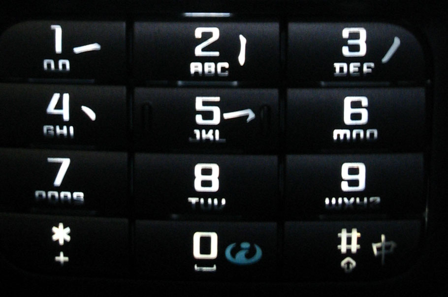 香港版诺基亚 3230的鍵盤，我自己拍的。